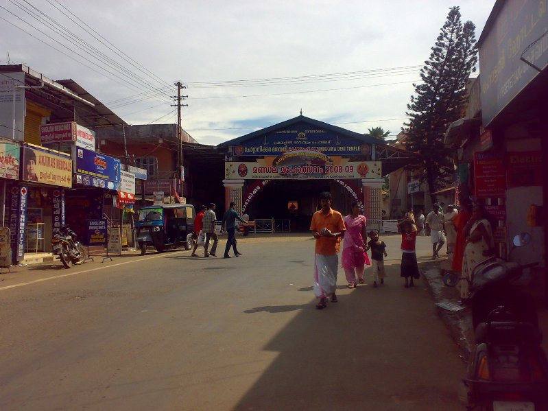 West Nada, Chottanikkara